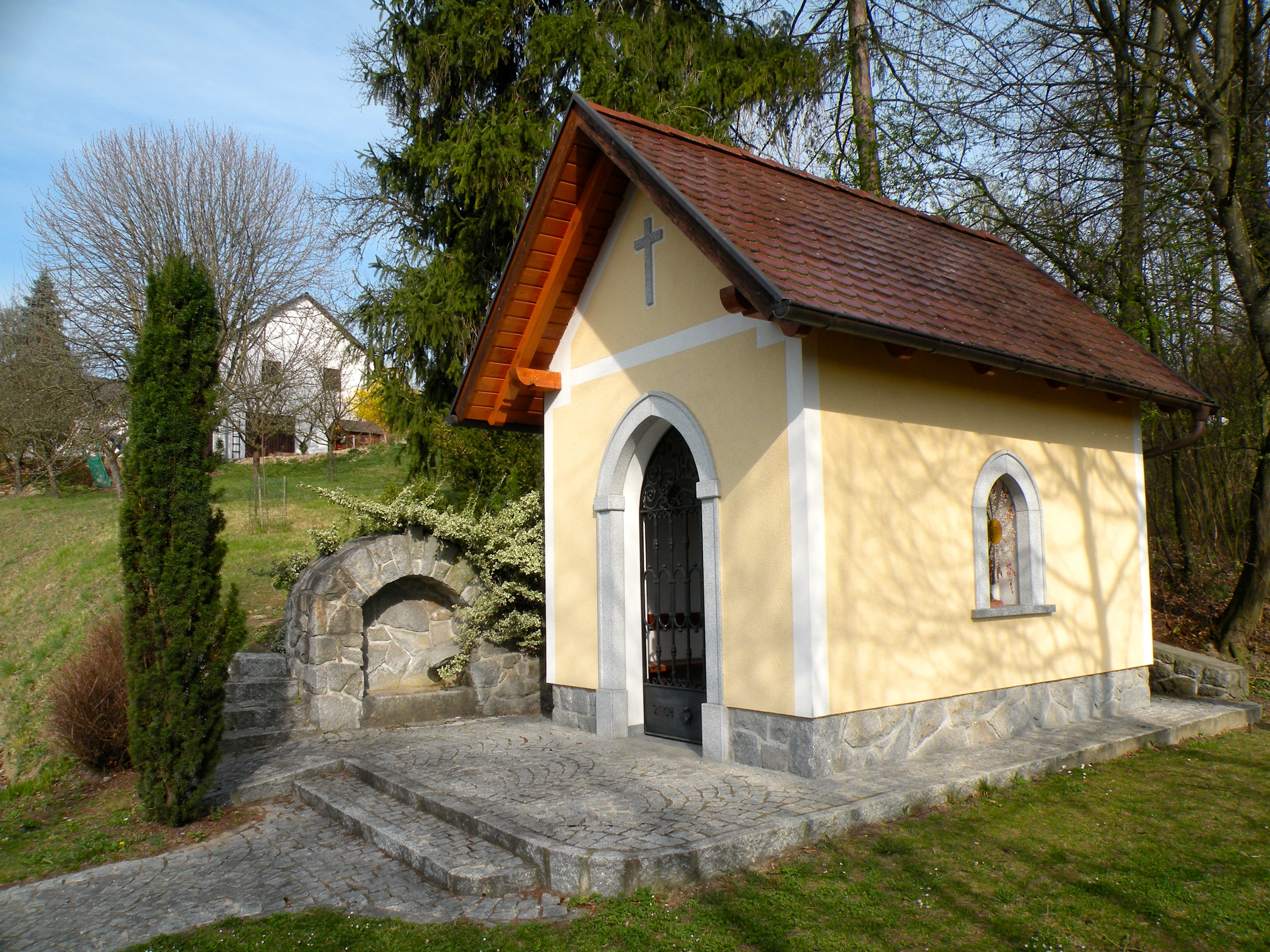 Strohbauer-Kapelle (Marienkapelle) an einer Kehre des Güterweges Strohberg in der Ortschaft Tobra der Katastralgemeinde Pergkirchen in der Stadt Perg